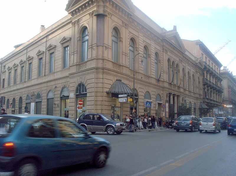 sono l'autore rilascio tutti i diritti